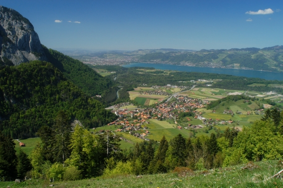 Wimmis, gesehen aus dem Gatafel am Niesen